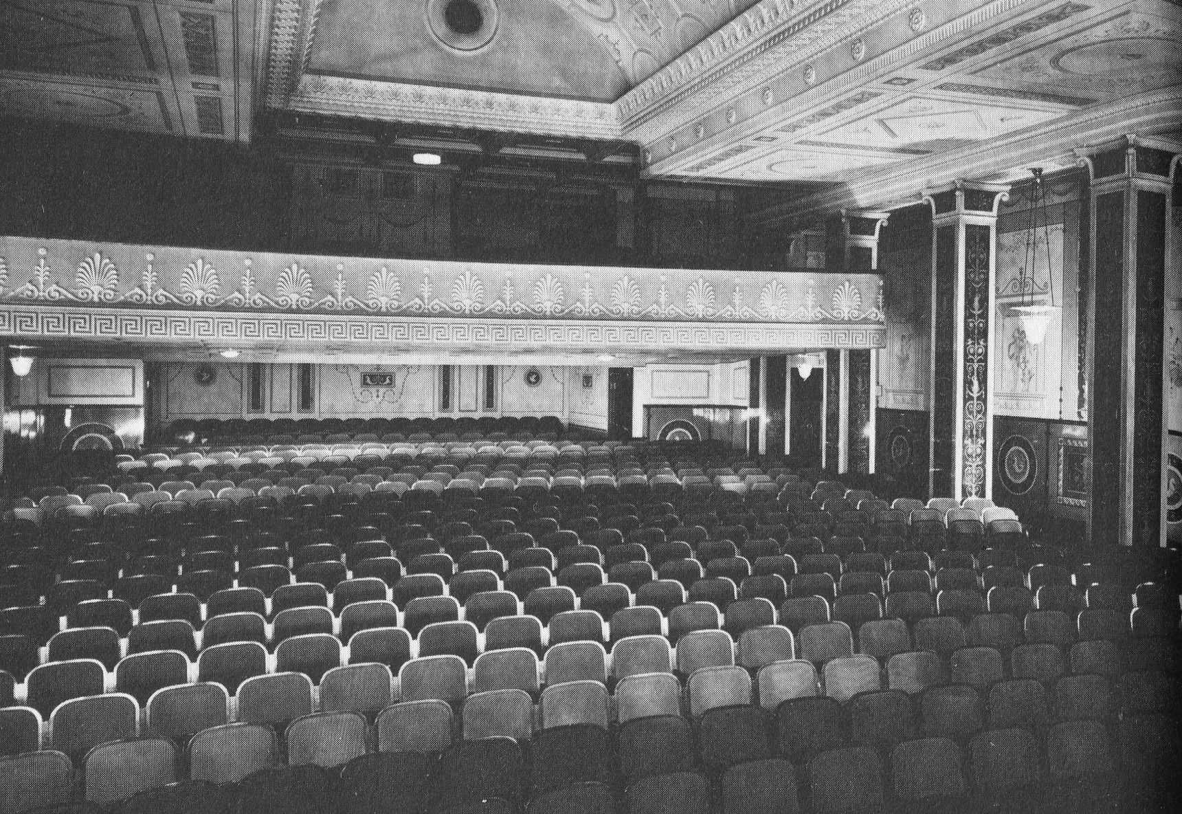 iograf "Metropol-Palais", salongen